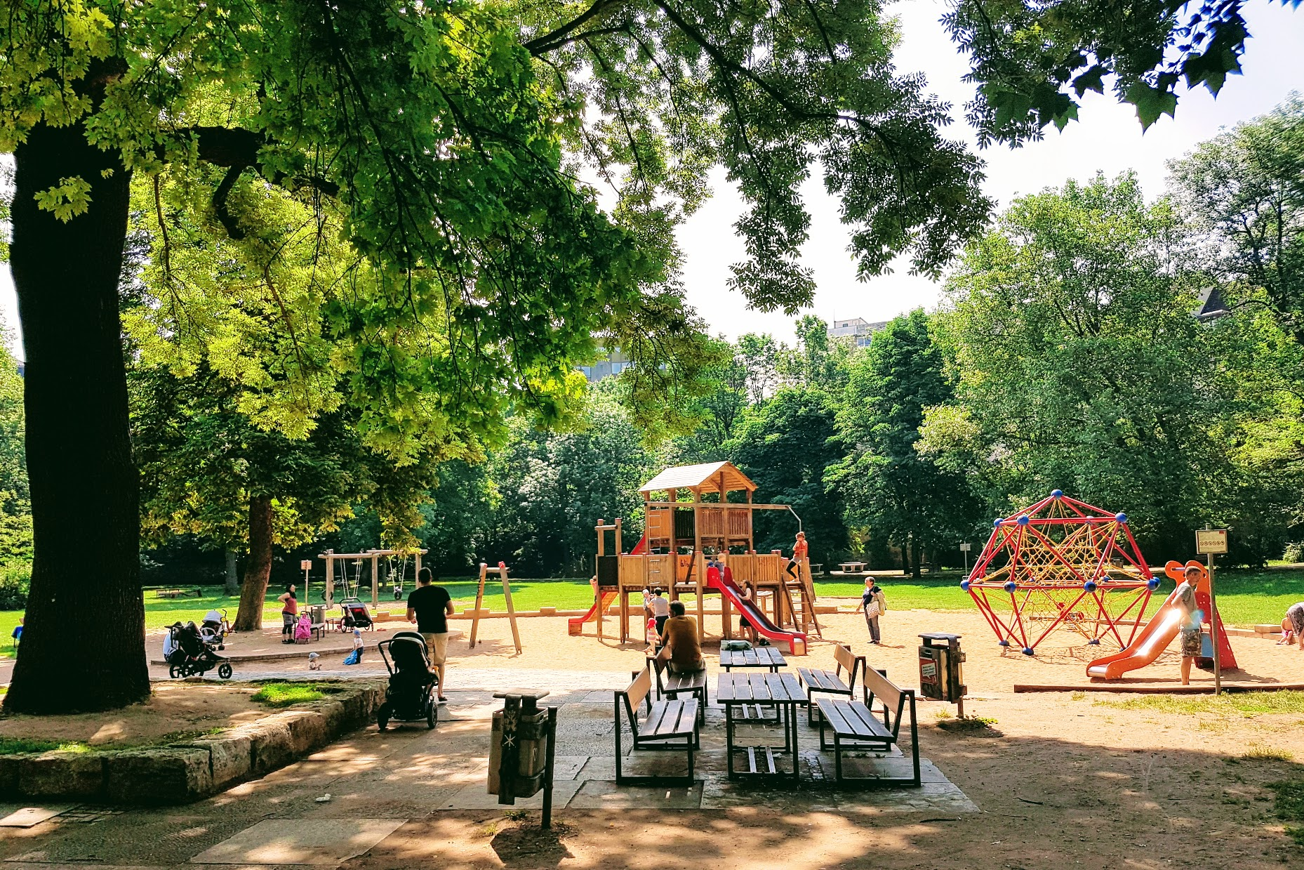 Spielplatz Rosenaupark